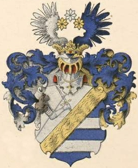 Handtwigi suguvõsa aadlivapp